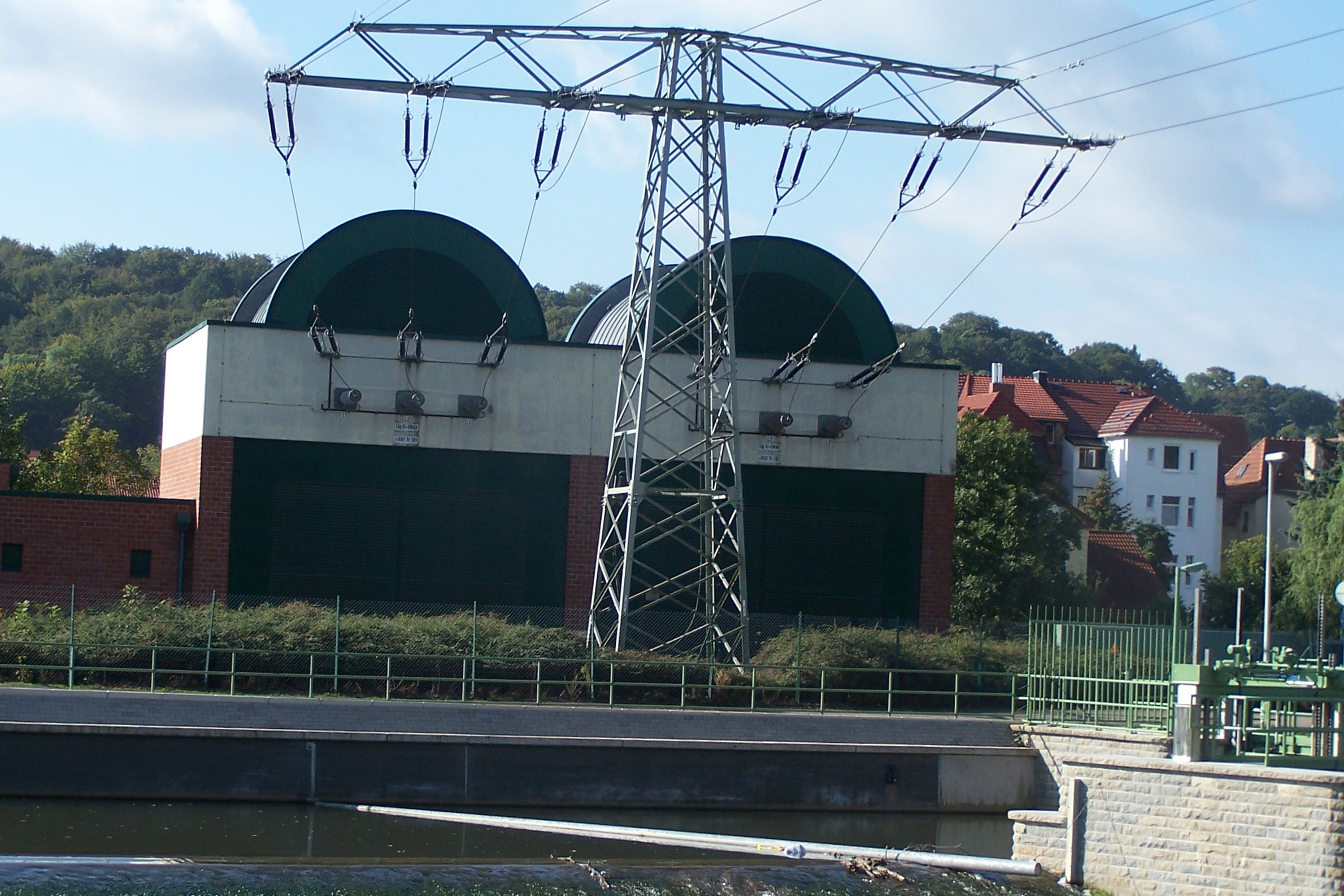 Ansicht von Norden.